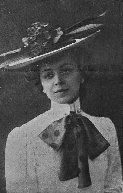 Helena Sulima (-1906)